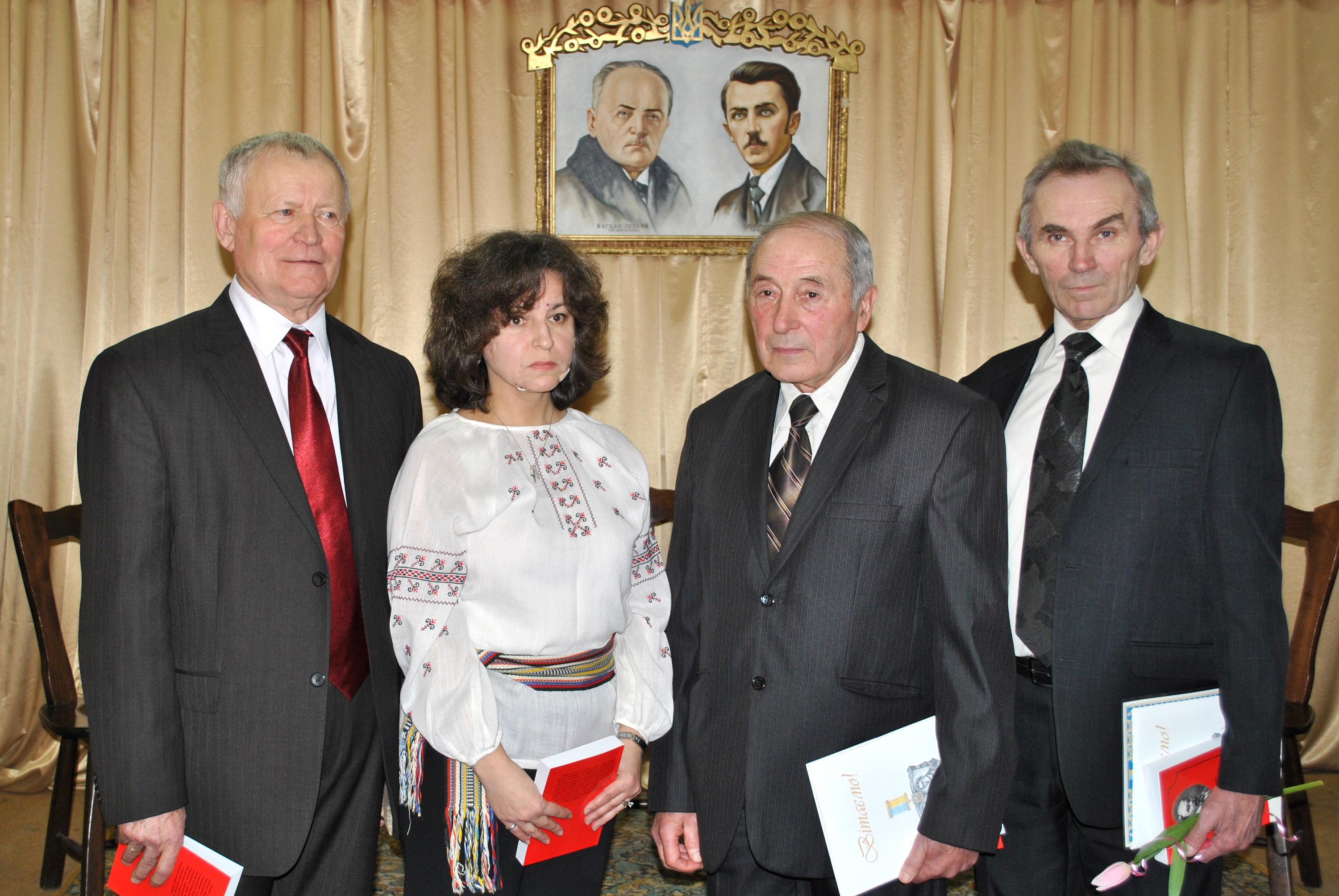 Лауреати премії імені Братів Богдана та Левка Лепких Тернопільської обласної школи мистецтв (директор Остап Гайдукевич), Оксана Ваврик, Богдан Ничик, Іван Максимів.